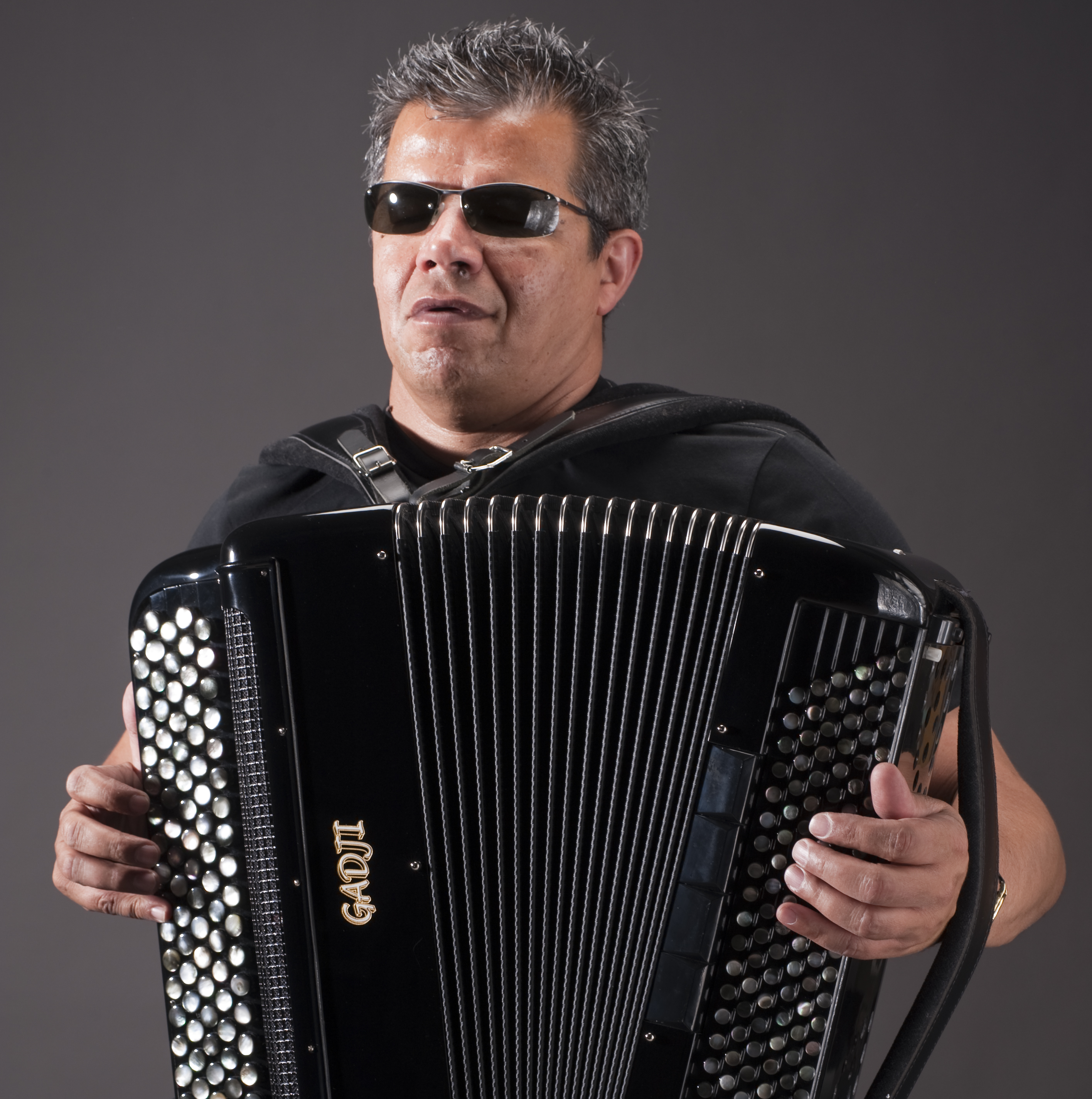 Marcel Loeffler , accordéoniste de Jazz, joue sur les accordéons Gadji